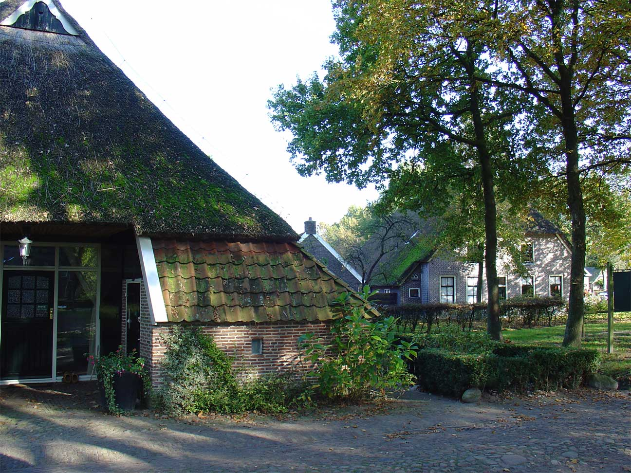 Dorpsgezicht Orvelte